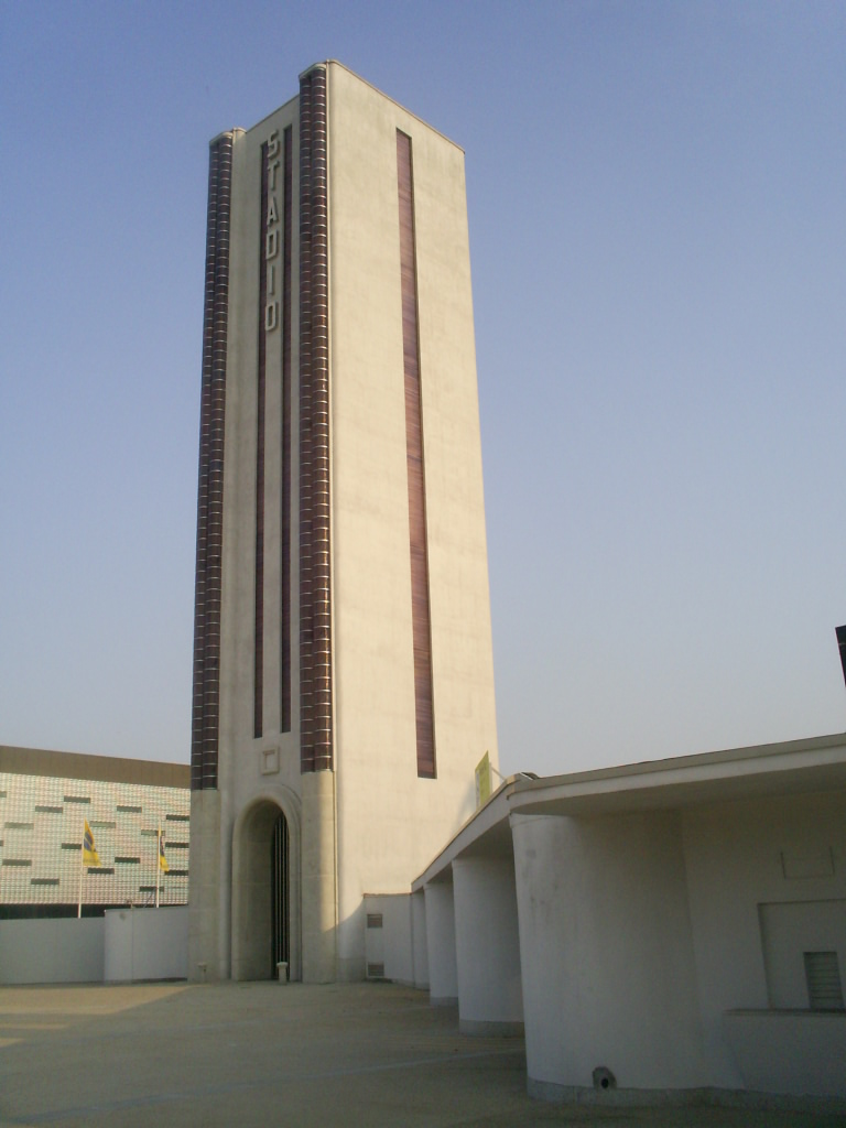 Stadion w Turynie